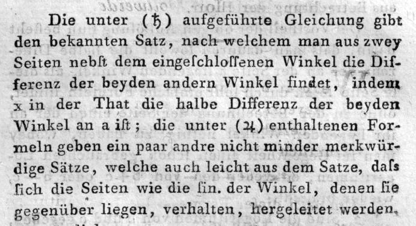 C. B. Mollweide: Zusätze zur ebenen und sphärischen Trigonometrie. In: Monatliche Correspondenz zur Beförderung der Erd- und Himmels-Kunde, 1808, Seiten 395.